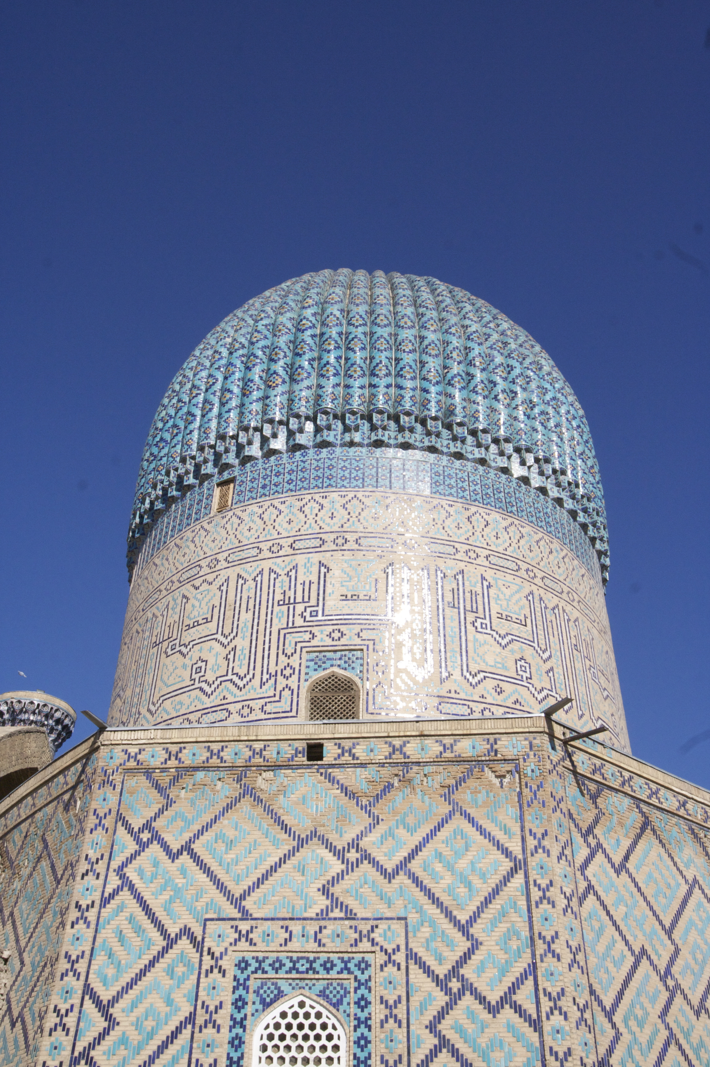 Mausoleo de Gur-e Amir, Samarcanda